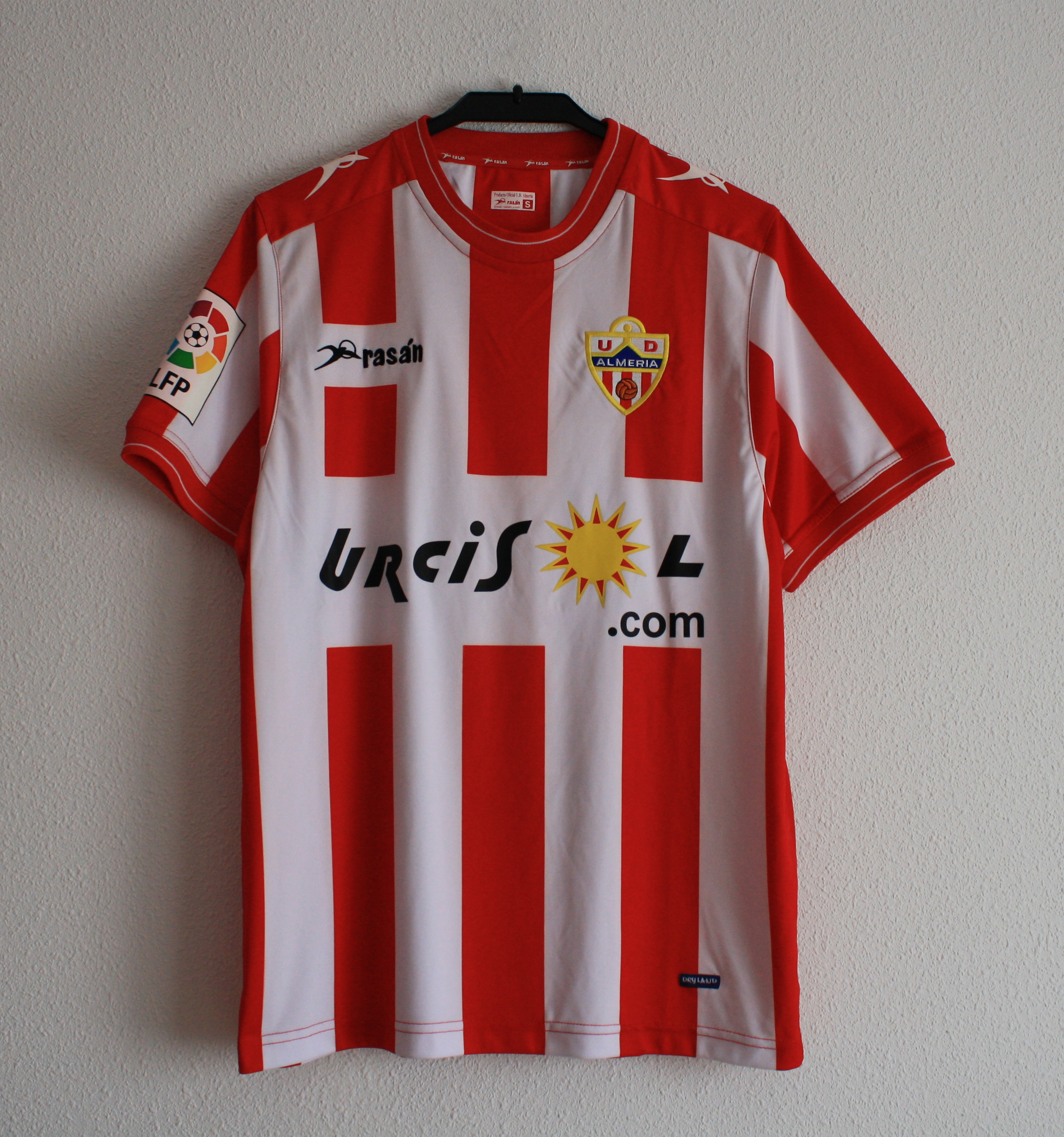 Réplica oficial de la camiseta de la primera vestimenta para la temporada 2011-2012 de la U.D. Almería